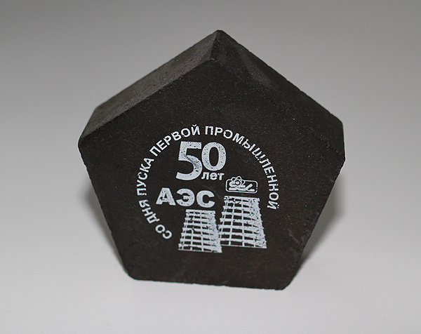 Сувенирный графит "50 лет Сибирской АЭС"